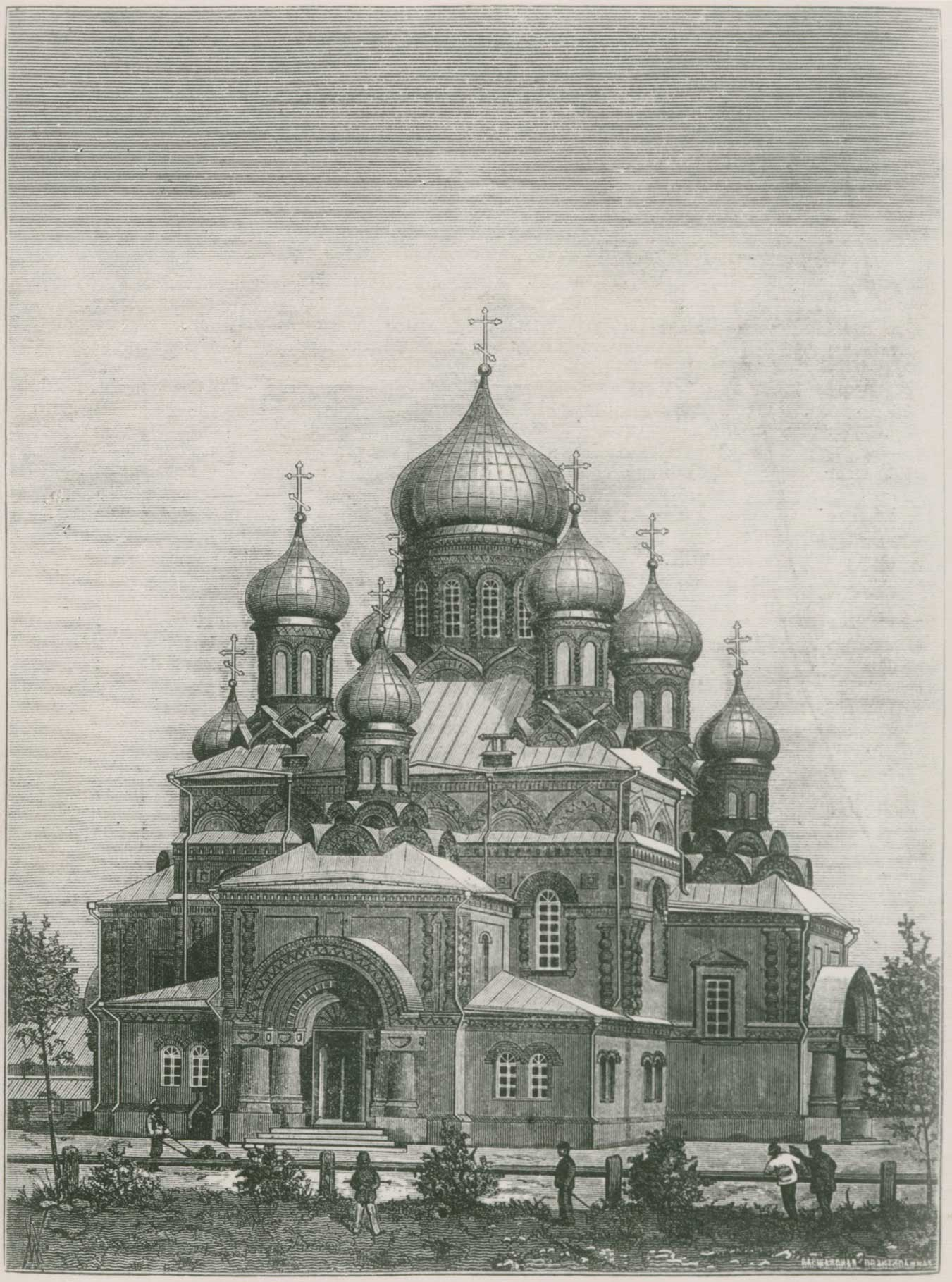 Беларуская (тарашкевіца): Барысаў (Barysaŭ), пляц Рынак (plac Rynak). Саборная Васкрасенская царква-мураўёўка